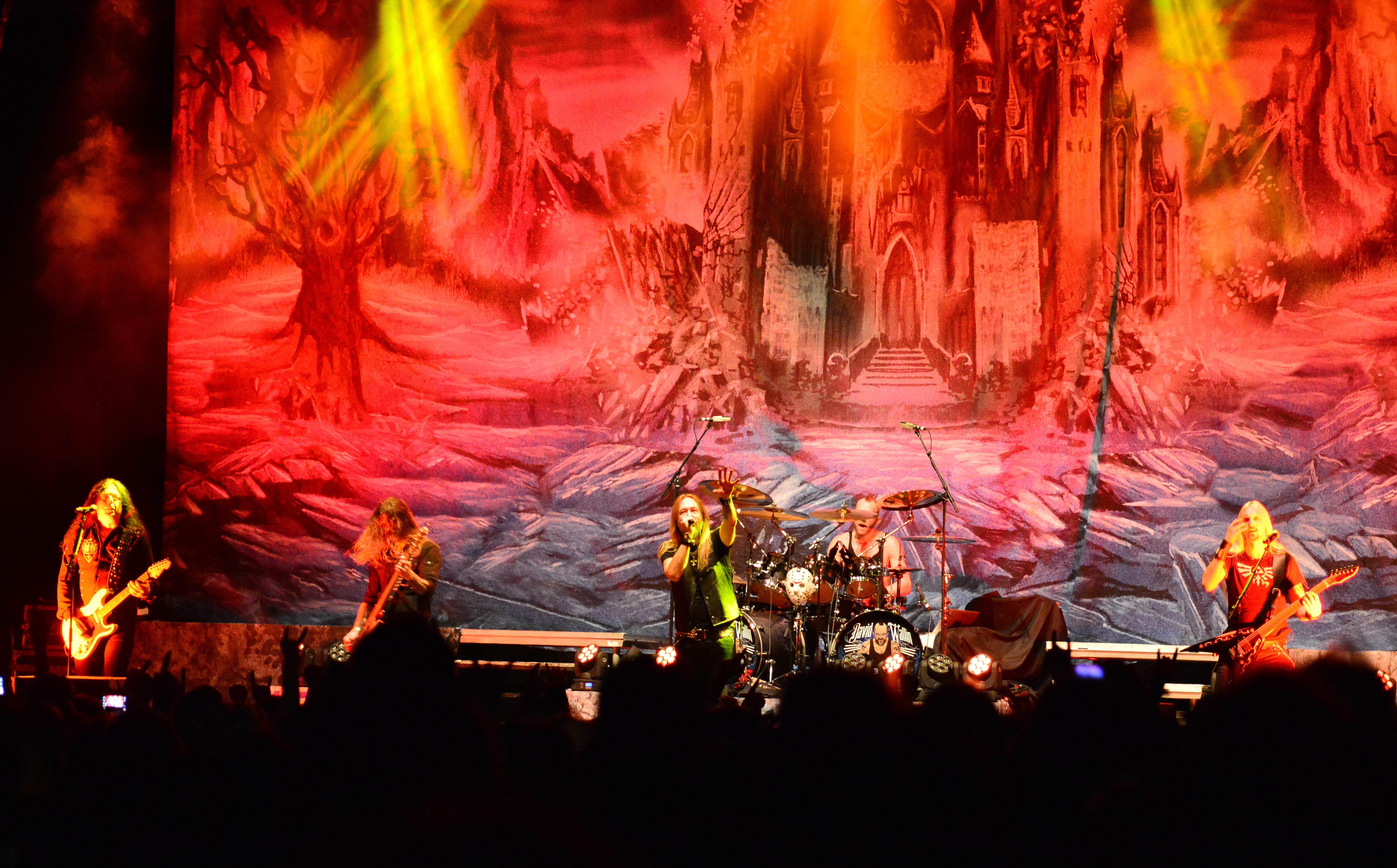 Hammerfall beim Waterkant X-Mas Bash 2015 in der Sporthalle Hamburg